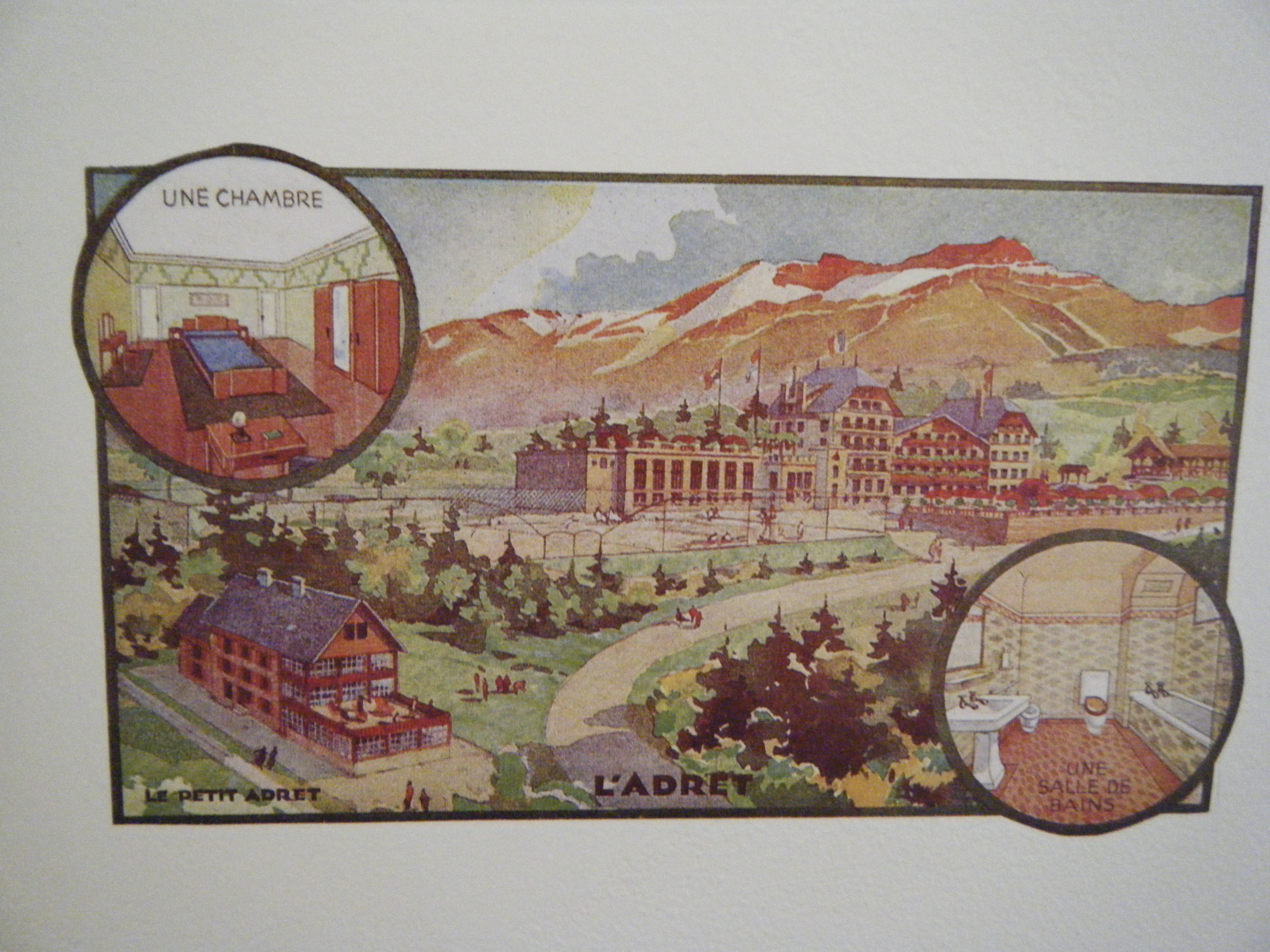 Le petit adret